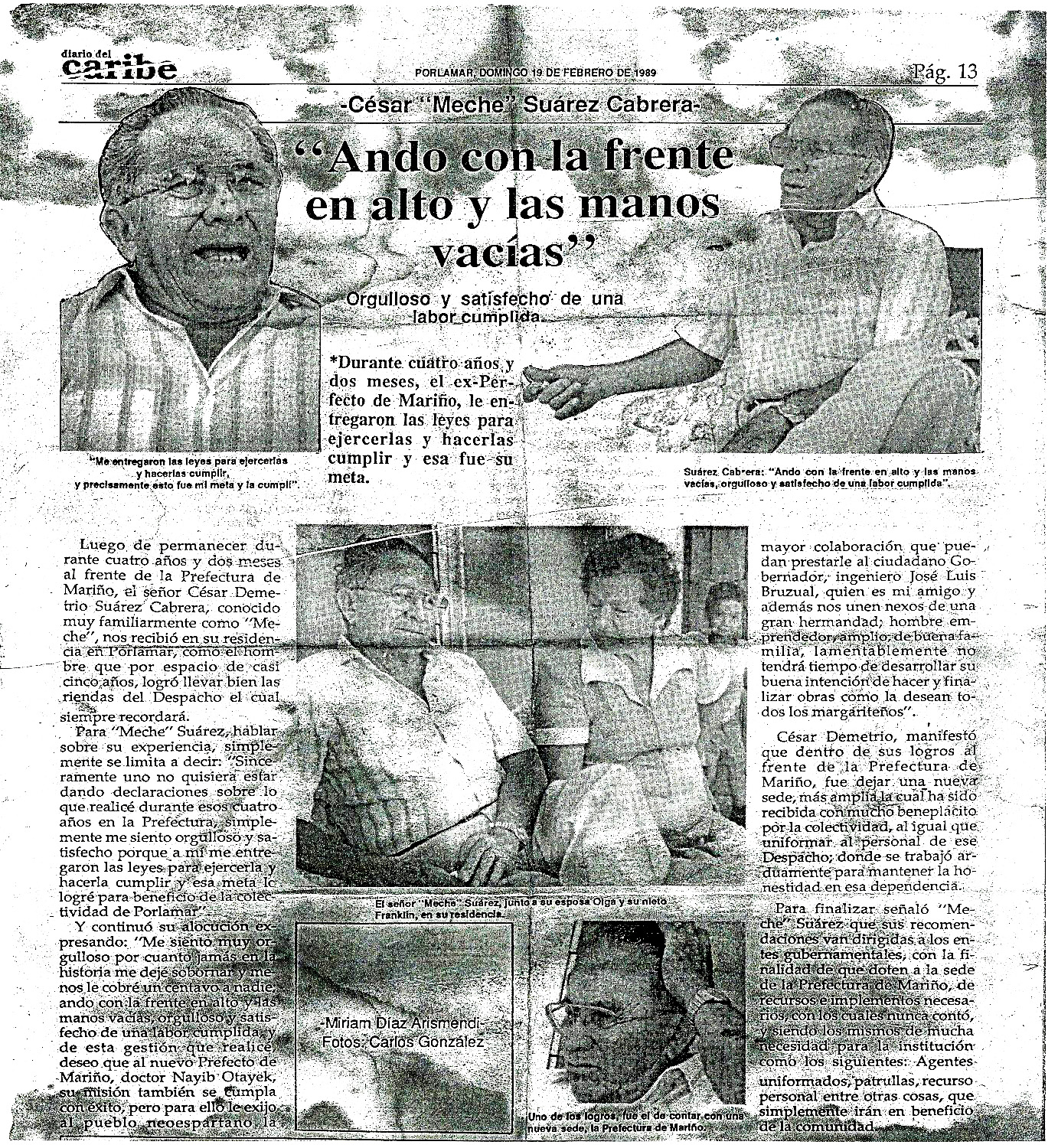 Articulo de Periódico Entrevista al Prefecto Cesar Suarez